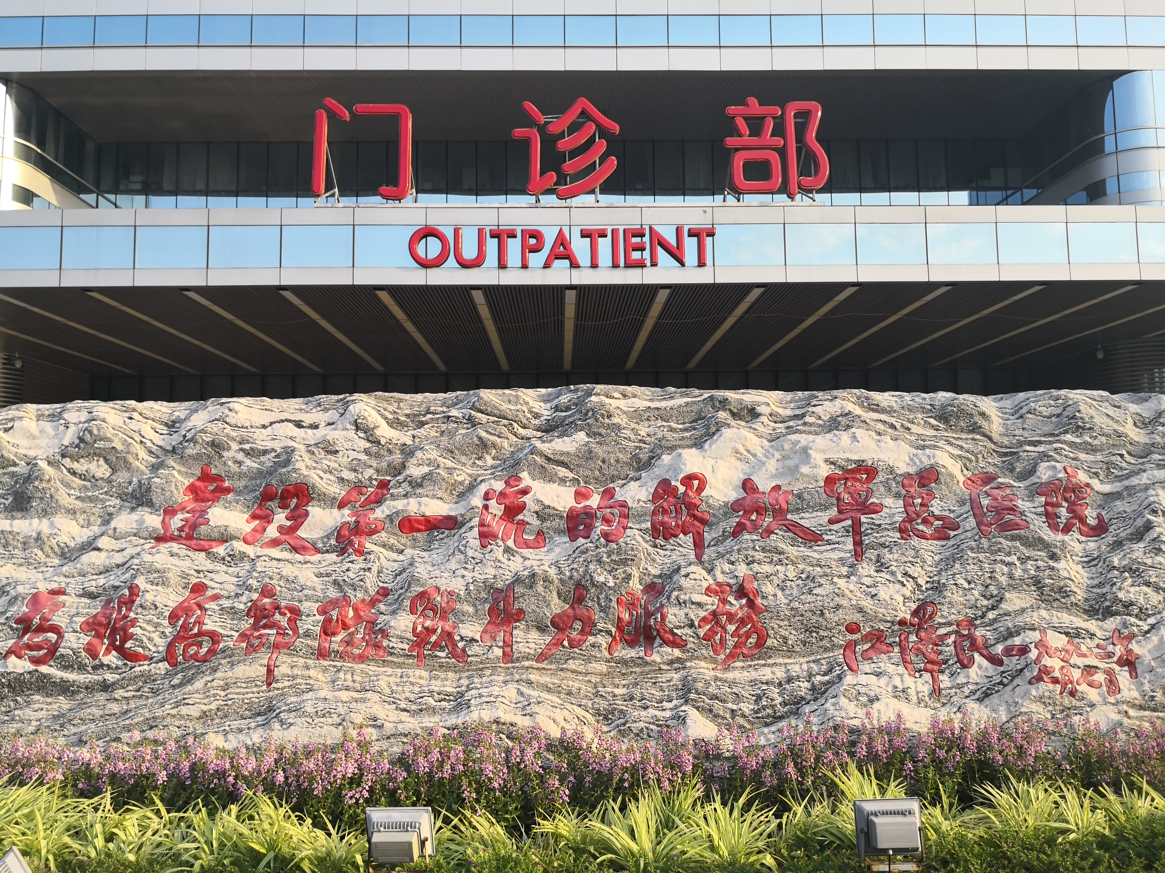 中国人民解放军总医院门诊部入口前的题字